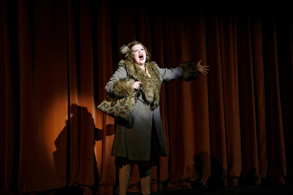 Gypsy 2012